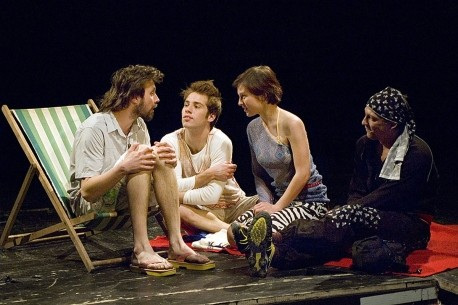 Z divadelního představení studentů DAMU "Cardym"